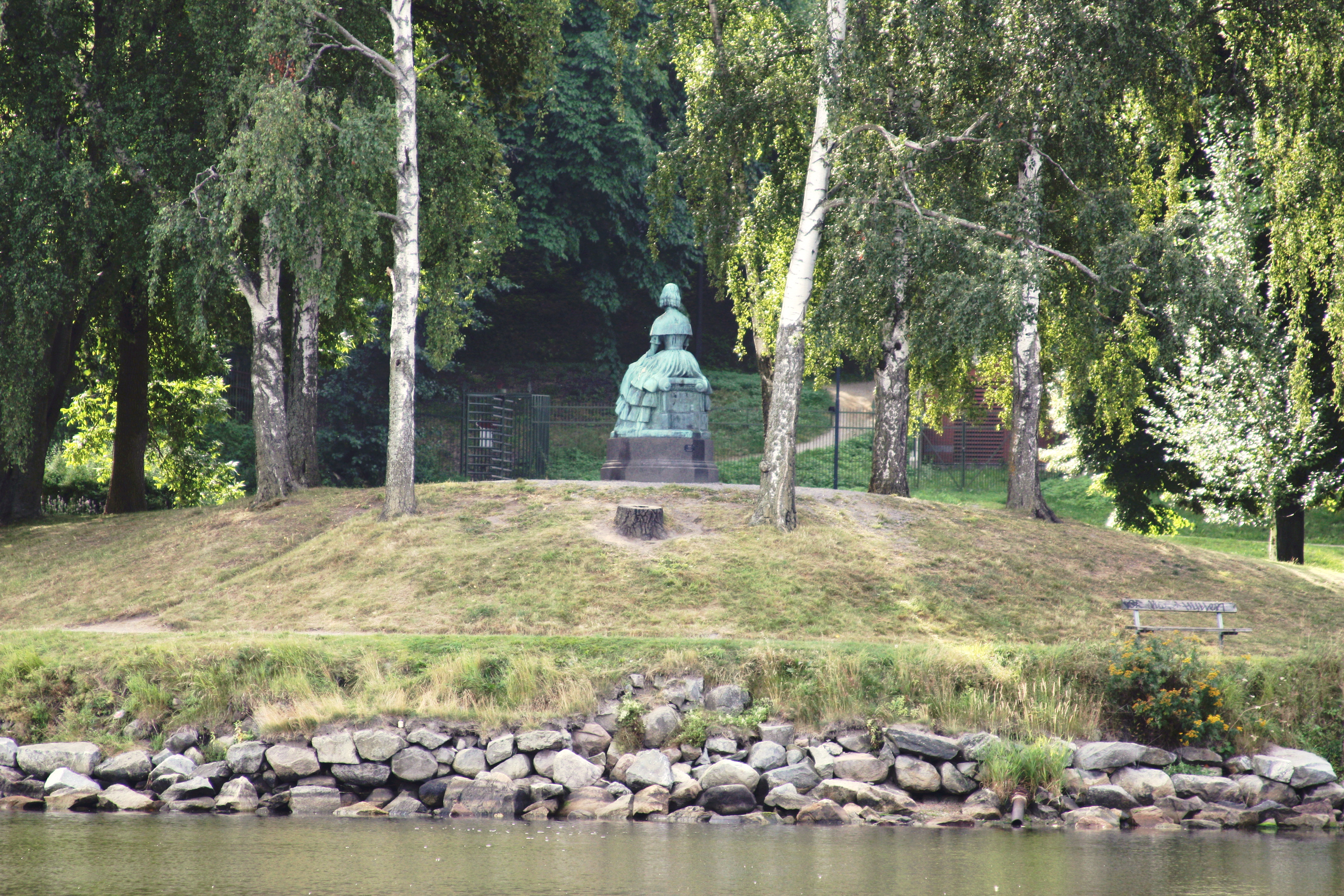 Stockholm